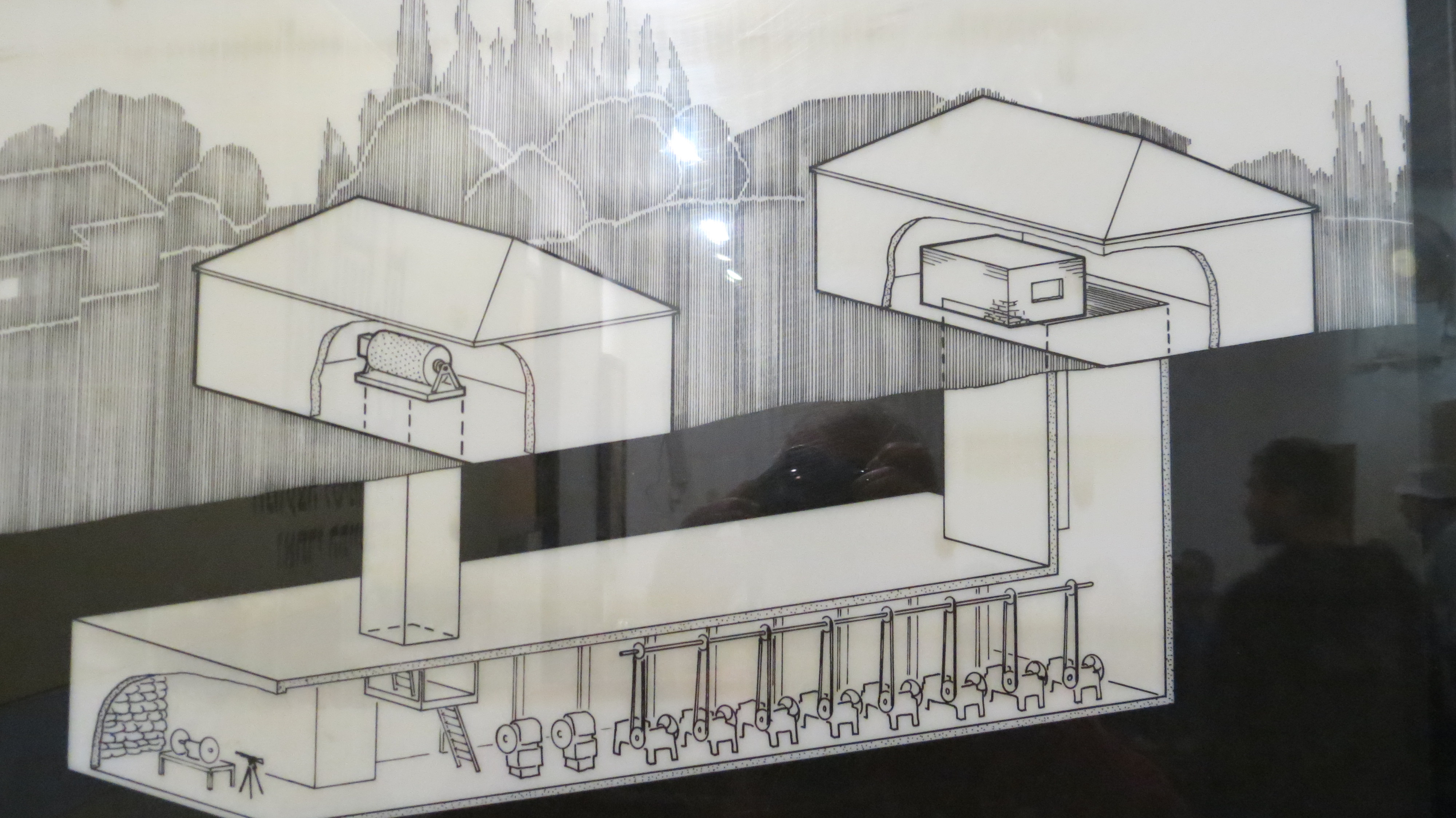 Machon Ayalon - Ayalon Institute, Rehovot, Israel מכון איילון